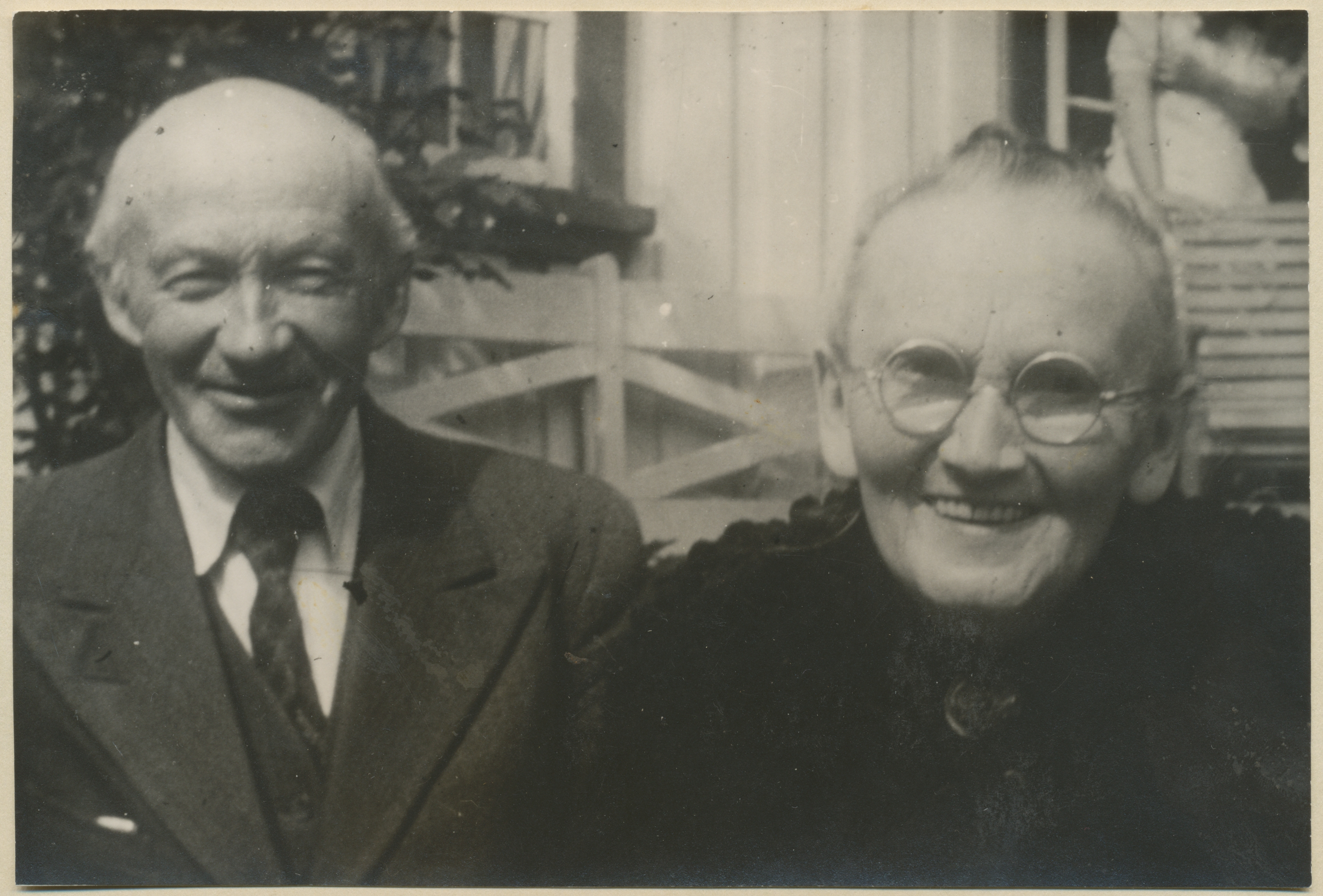 Eliseus Müller (f. 1878 i Verdal, d. 1966) og Kristiane (Wold) Müller (f. 1877 i Åsen, d. 1952). Bosatt på Vist i Verdal. Se bl.a. "Minner omkring familien Rygh på Haug i Verdal" av Eliseus Müller (Verdal, 1965). Om hennes foreldre, se Bygdebok for Åsen bind 2, s. 390. Fotograf / Photographer: Ukjent Fotoeier / Photo owner: Margaret Wibe Digitalisering / Digitizing: Arne Langås, 2011 Foto-ID / Photo ID: 067-0014 Har du utfyllende opplysninger? Legg gjerne igjen en kommentar nedenfor eller send e-post til . | Do you have additional information? Please leave a comment or send an e-mail to .